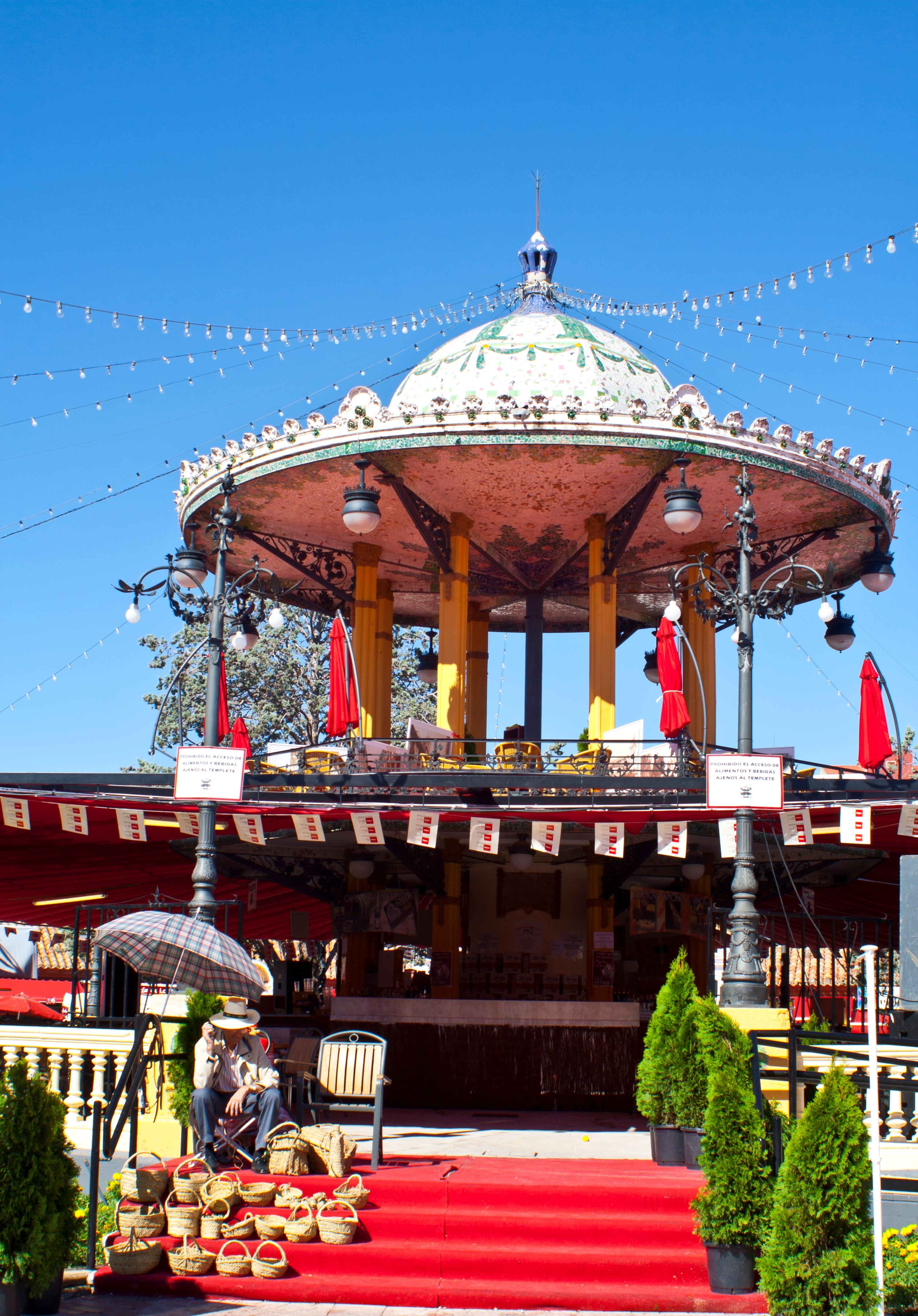 Espartero vendiendo en el Templete de la Feria de Albacete